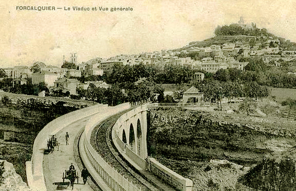 Forcalquier viaduc et vue générale